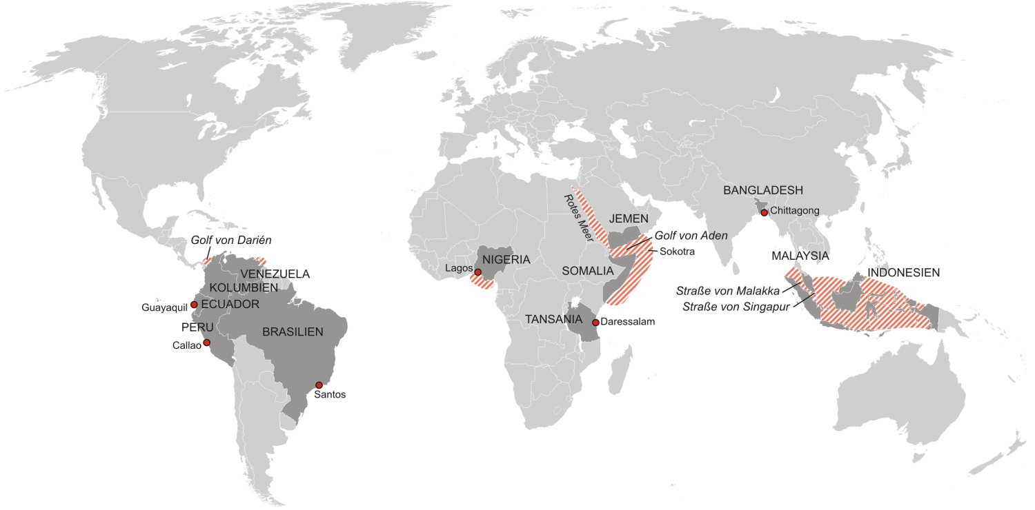 Weltweite von Piraterie betroffene Gebiete und Häfen